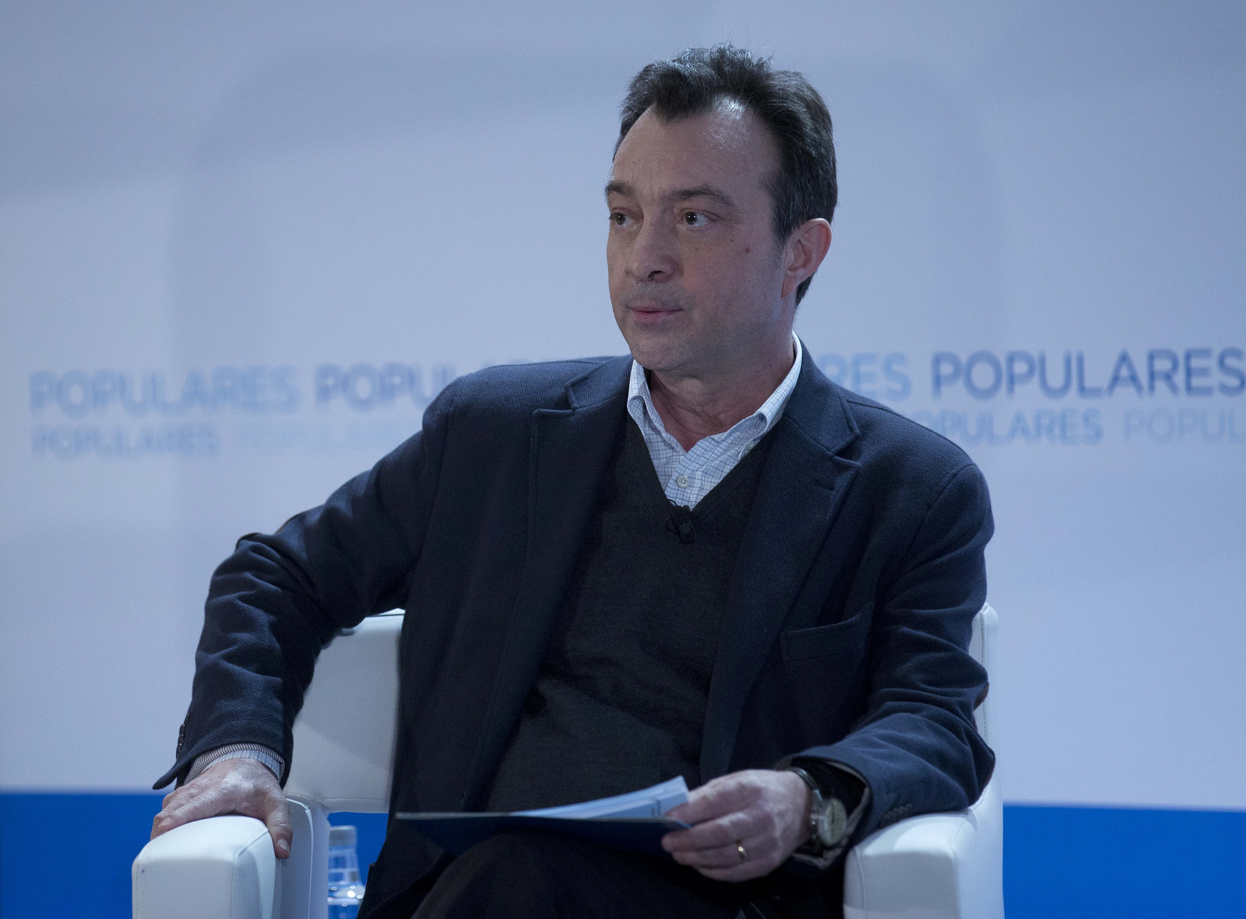 Jornadas Aún queda mucho por hacer